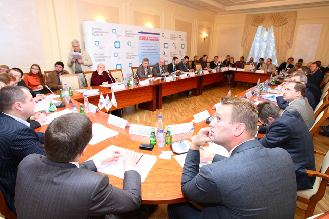 Алексей Навальный на ИНСОР